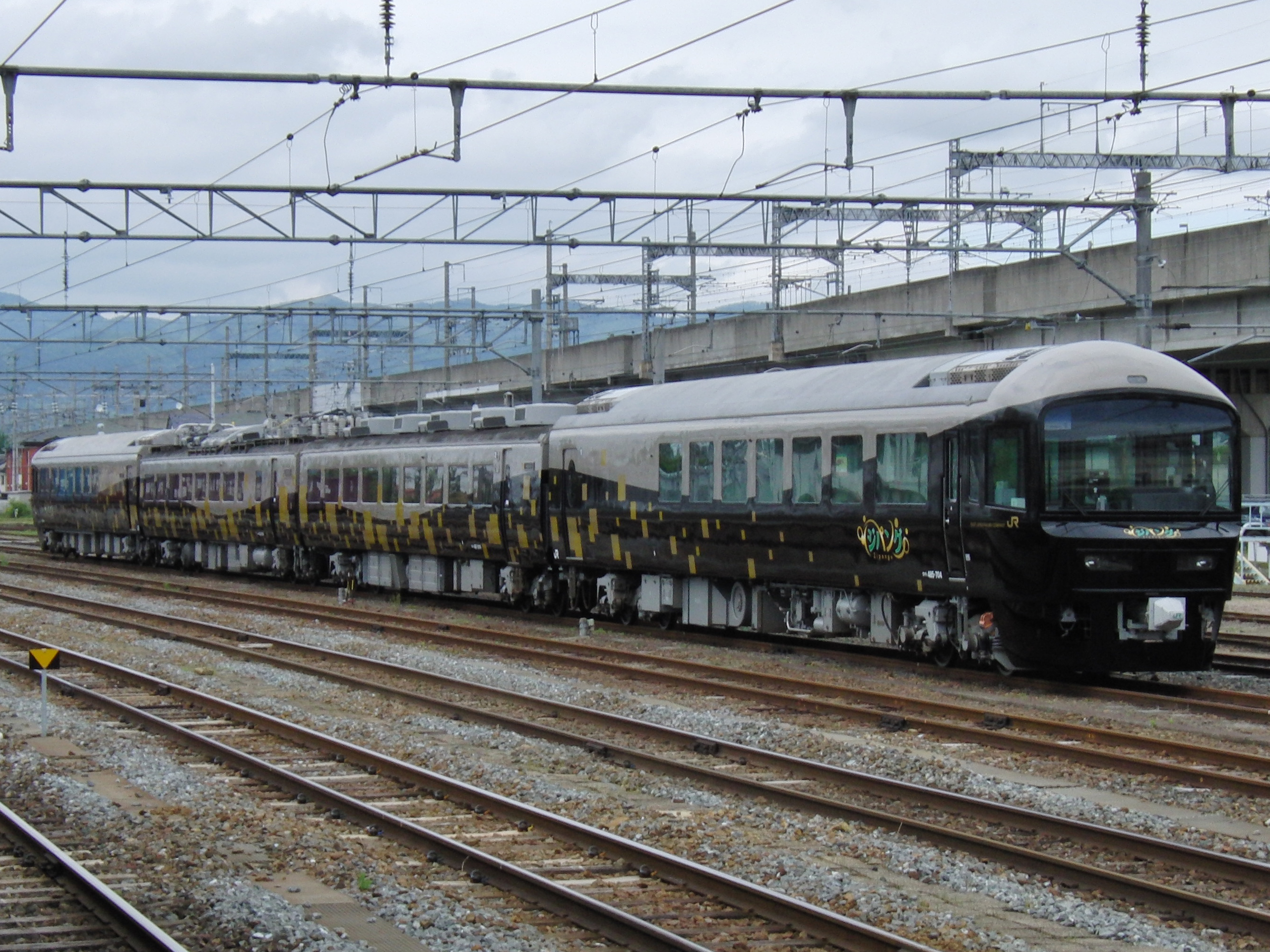 485系電車ジョイフルトレイン ジパング 一ノ関駅にて撮影